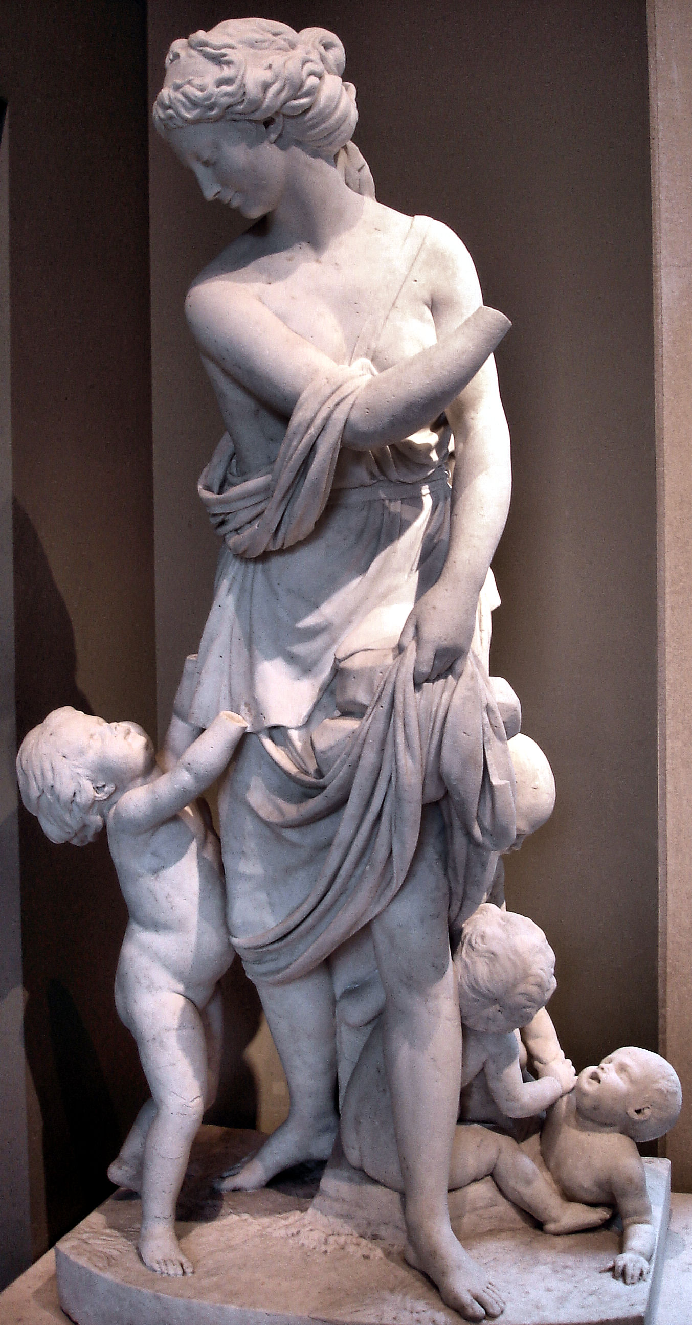 L'oeuvre, dont le modèle en plâtre fut montré au Salon de 1773, fut commandée par l'abbé Terray, dernier contrôleur général des Finances de Louis XV et éphémère directeur des Bâtiments du Roi avant l'avènement de Louis XVI en 1774. Elle devait orner la galerie de sculptures de son hôtel parisien avec Mercure ou le Commerce de Pajou, Apollon ou les Beaux-Arts de Mouchy (tous deux au Louvre) et Cérès ou l'Abondance de Pigalle (collection particulière).Selon les Métamorphoses d'Ovide, Pyrrha et son époux Deucalion, sauvés du déluge, repeuplèrent le monde en jetant derrière eux des pierres. Celles-ci, au contact de la terre, se changèrent respectivement en femmes et en hommes (ici représentés par des enfants). Le marbre, récemment identifié dans le parc du château de Ferrières, a été très endommagé par son exposition prolongée en plein air.Dépôt de la Chancellerie des Universités de Paris, 1998